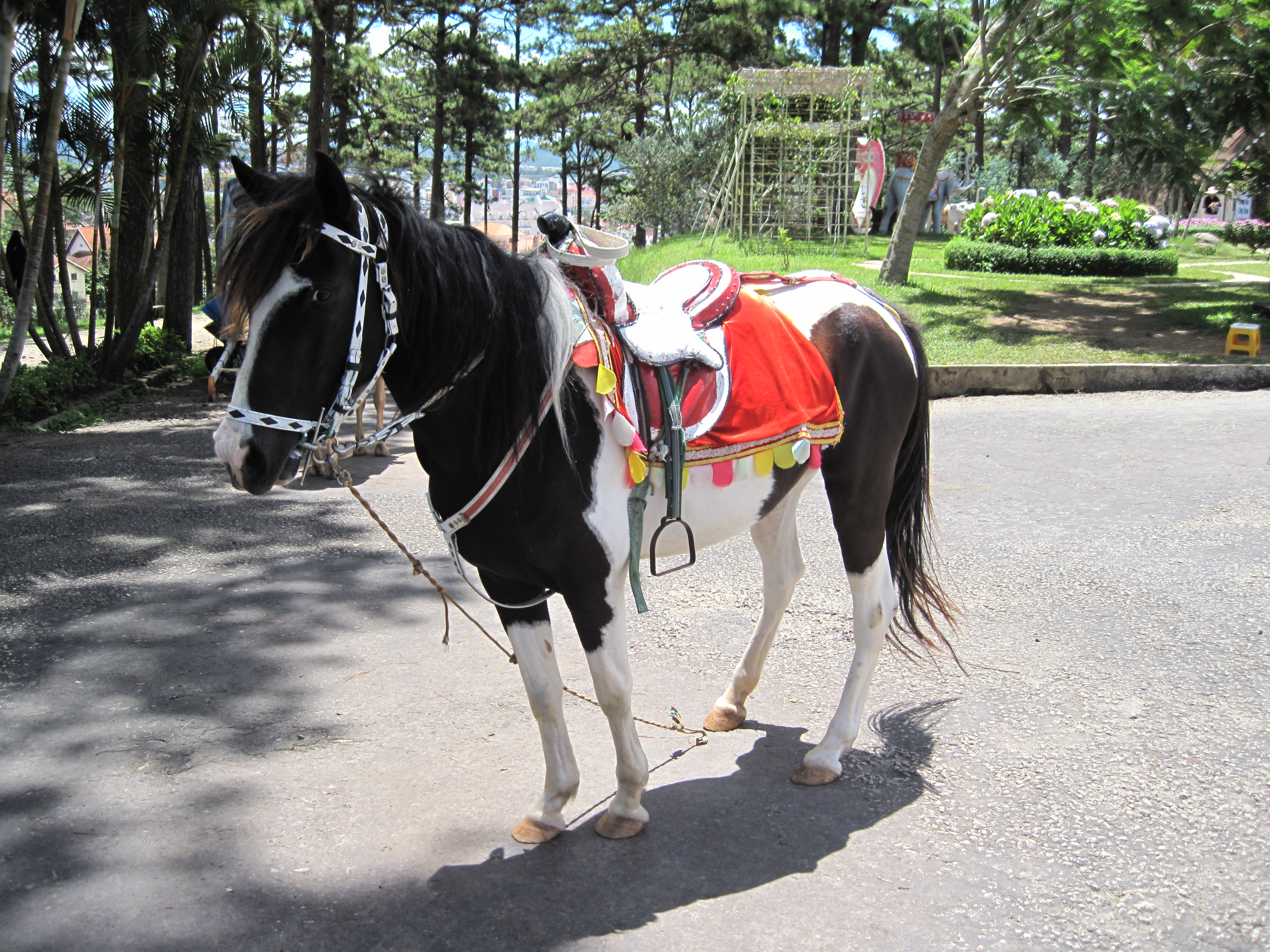 Hình chụp một con ngựa Việt Nam tại Đà Lạt vào năm 2011, tự chụp bằng máy ảnh cá nhân và tải lên Wiki